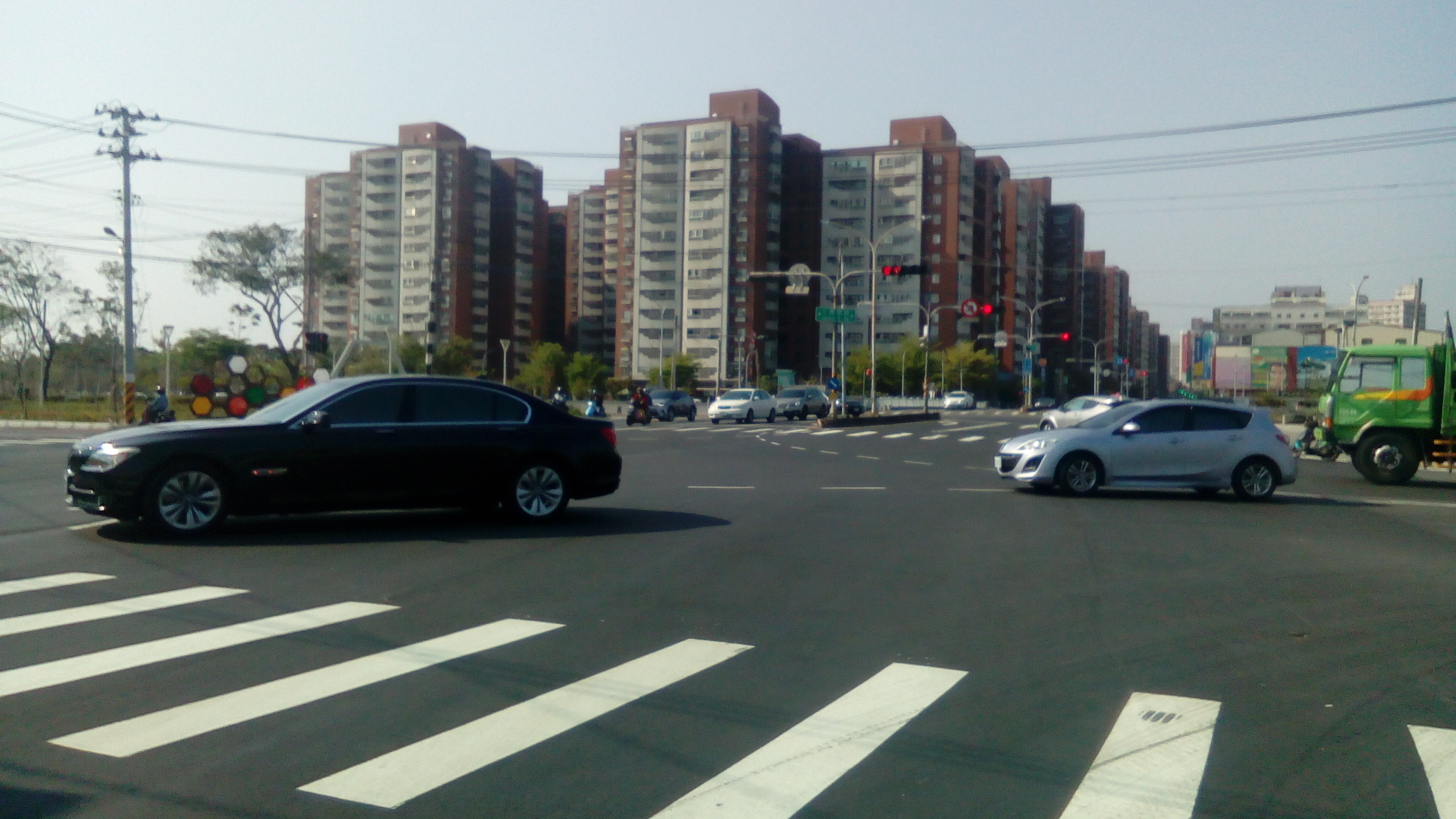 從岡山路(阿公店溪)由南往北拍攝